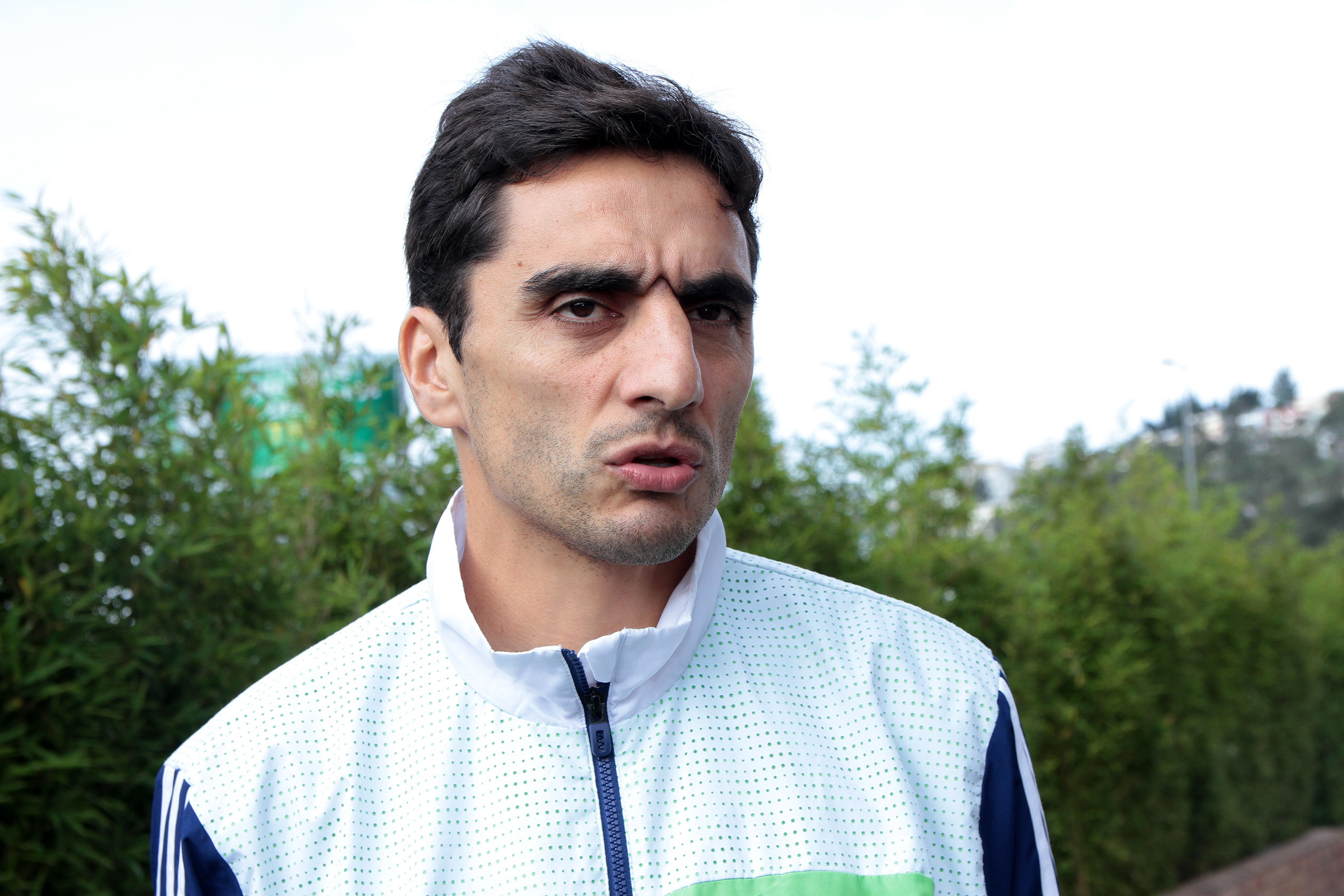 Quito, 6 abr (ANDES).- Martín Mandra, ex futbolista del club Deportivo Quito prepara su partido de despedida. Fotografías: Carlos Rodríguez/ANDES.